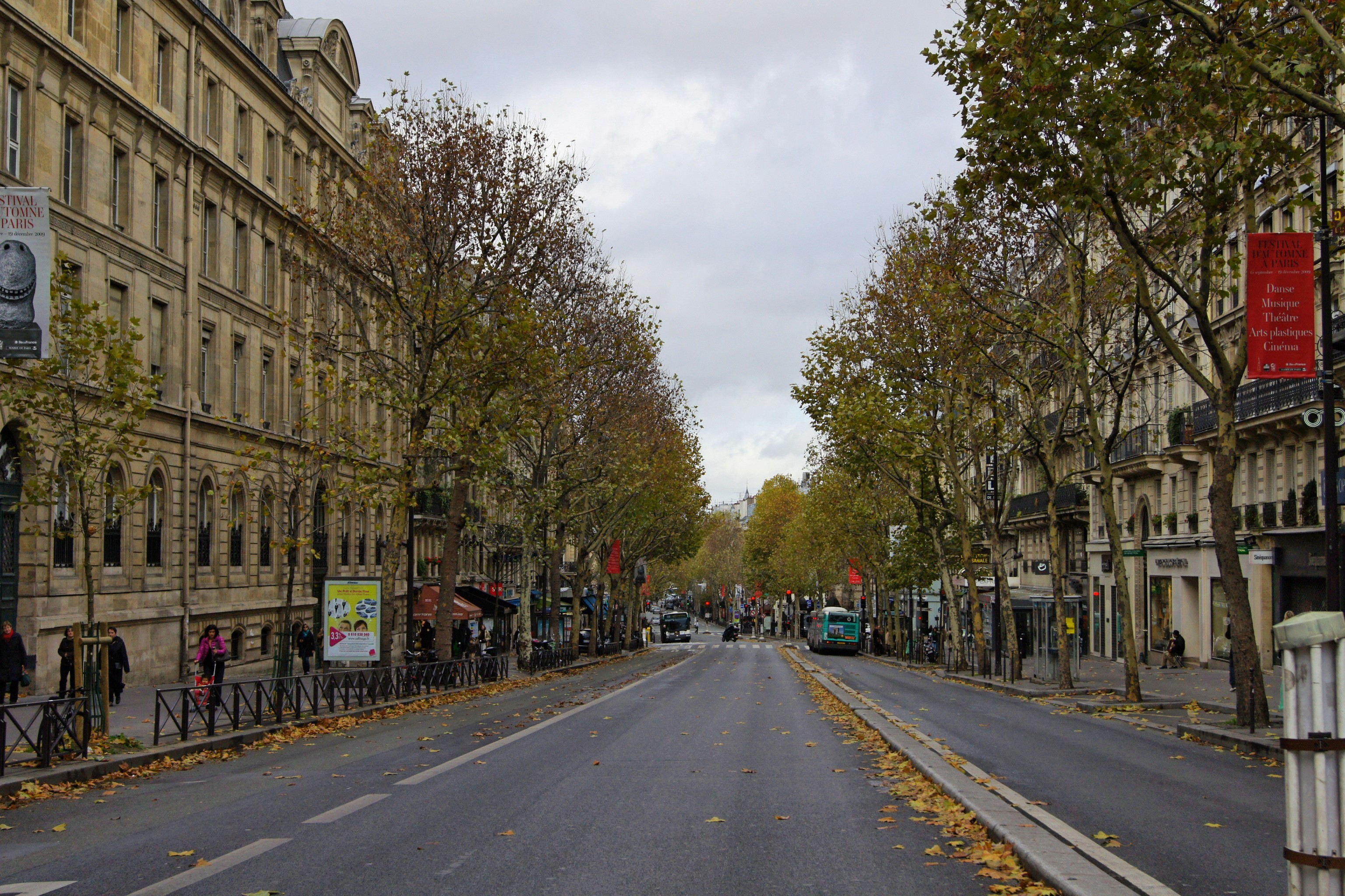 Boulevard Saint Michel à Paris.